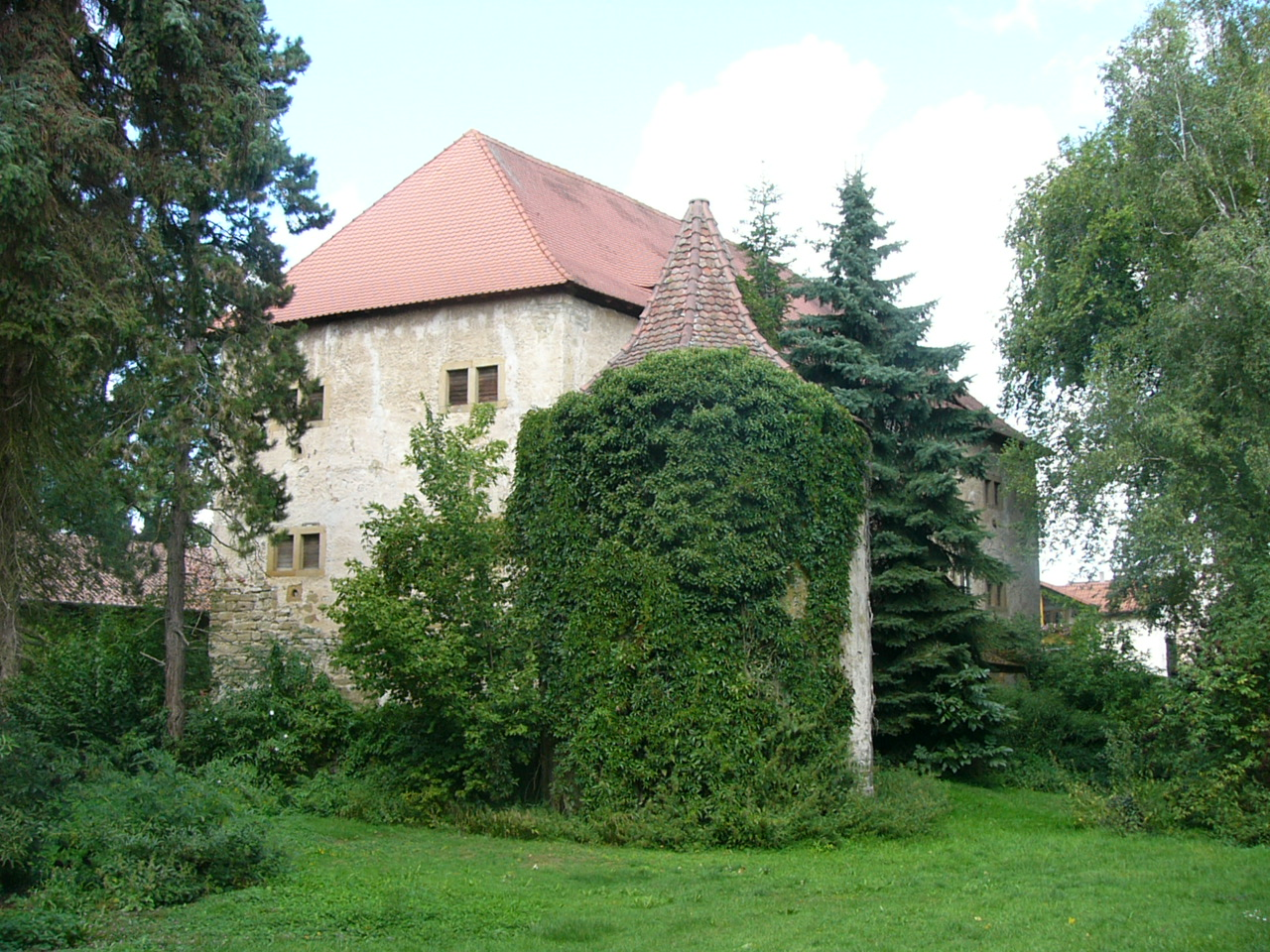 "Zehtnscheune" und Turm